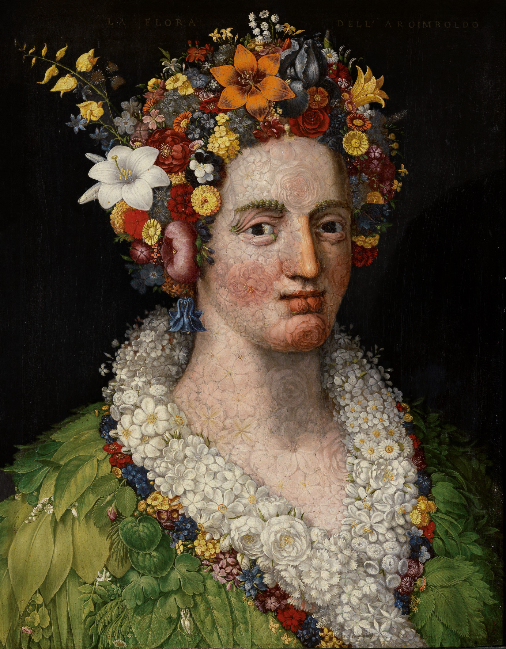 "Flora", de Arcimboldo. Colección privada.